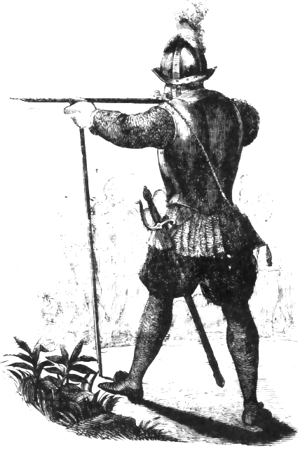 Pedro de Candia, artillero mayor del Perú y uno de los Trece de la Fama (siglo XVI)